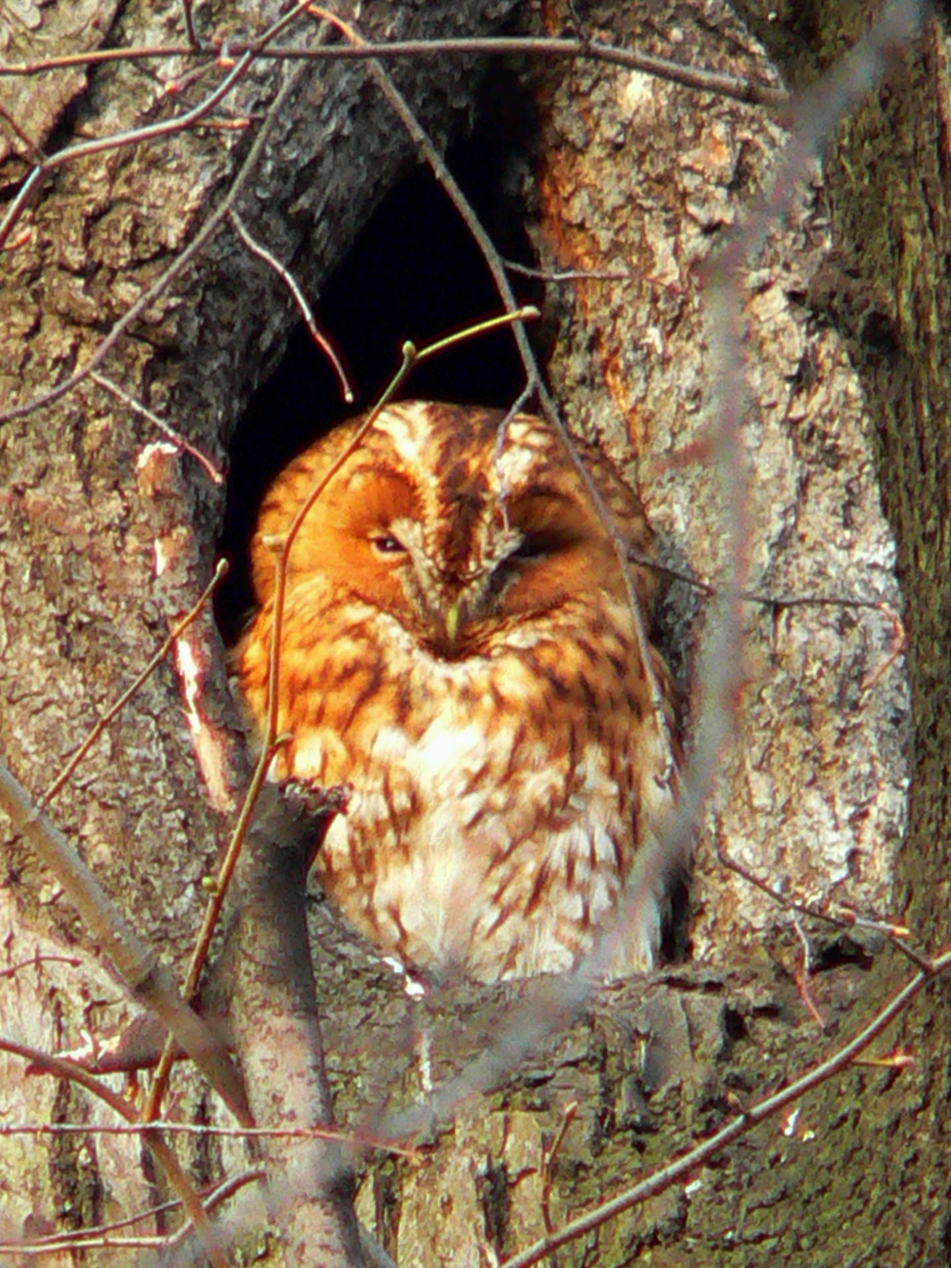 tawny owl (Strix aluco), Warsaw, Poland